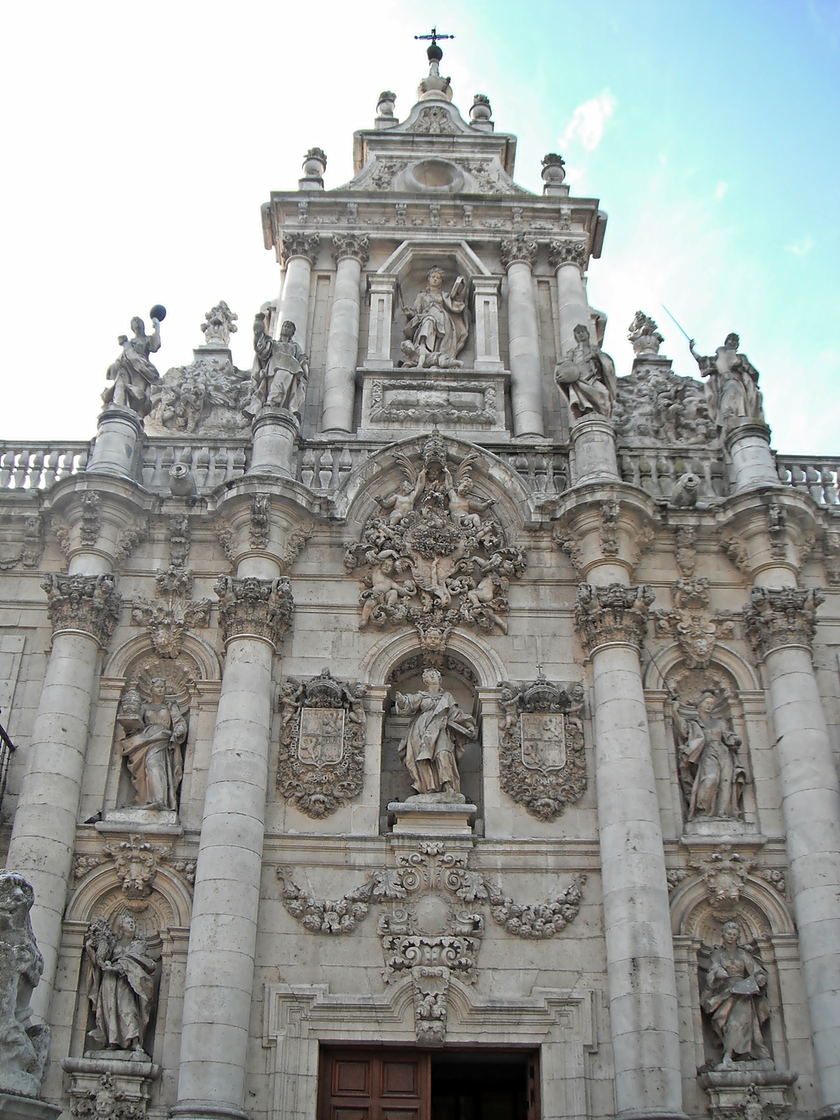 Fachada de la Universidad de Valladolid, en Valladolid, capital de Castilla y León